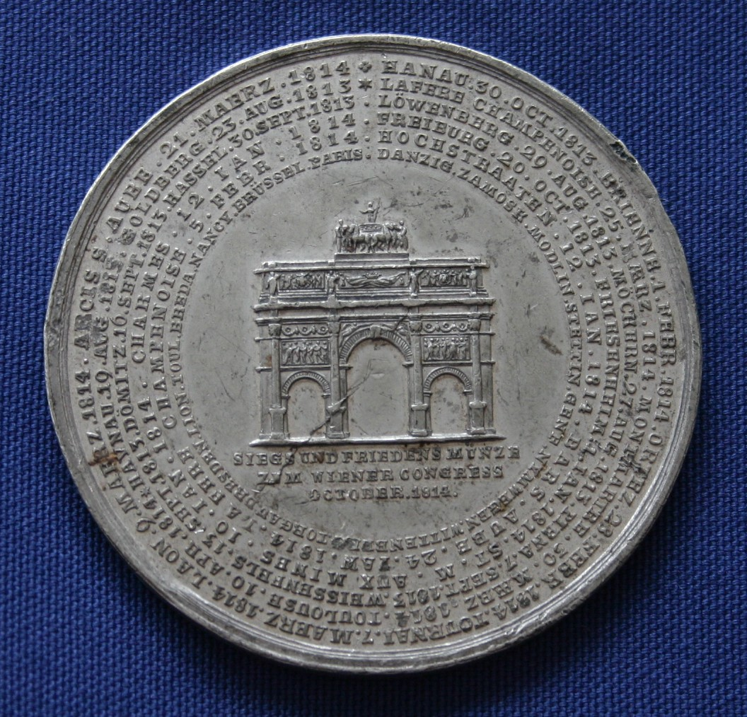 Medaille Wiener Kongress